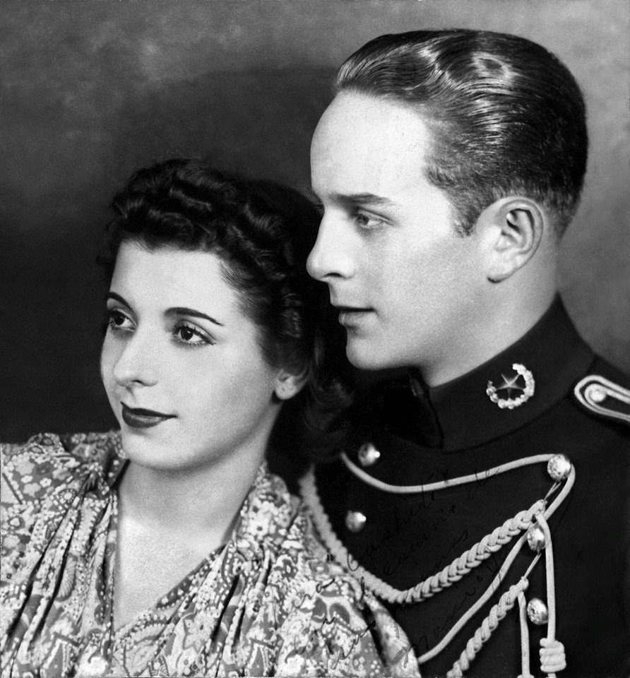 Jacobo Arbenz Guzman y su esposa, Cristina Vilanova.